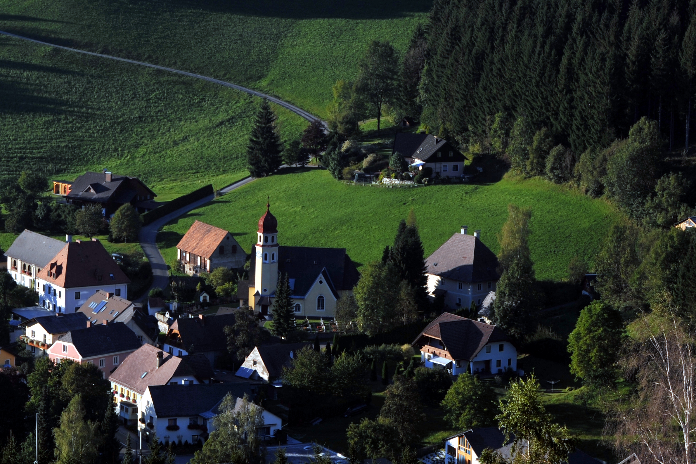 Kath. Pfarrkirche hl. Thomas und Friedhof Dieses Foto wurde im Rahmen des von Wikimedia Österreich unterstützten Projekts Wiki takes oberes Murtal erstellt. The making of this work was supported by Wikimedia Austria. For other files made with the support of Wikimedia Austria, please see the category Supported by Wikimedia Österreich. Object location47° 09′ 04.83″ N, 14° 50′ 48.74″ E